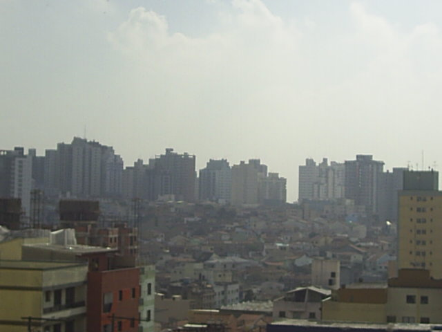 São Caetano do Sul. Bairro Santa Maria.